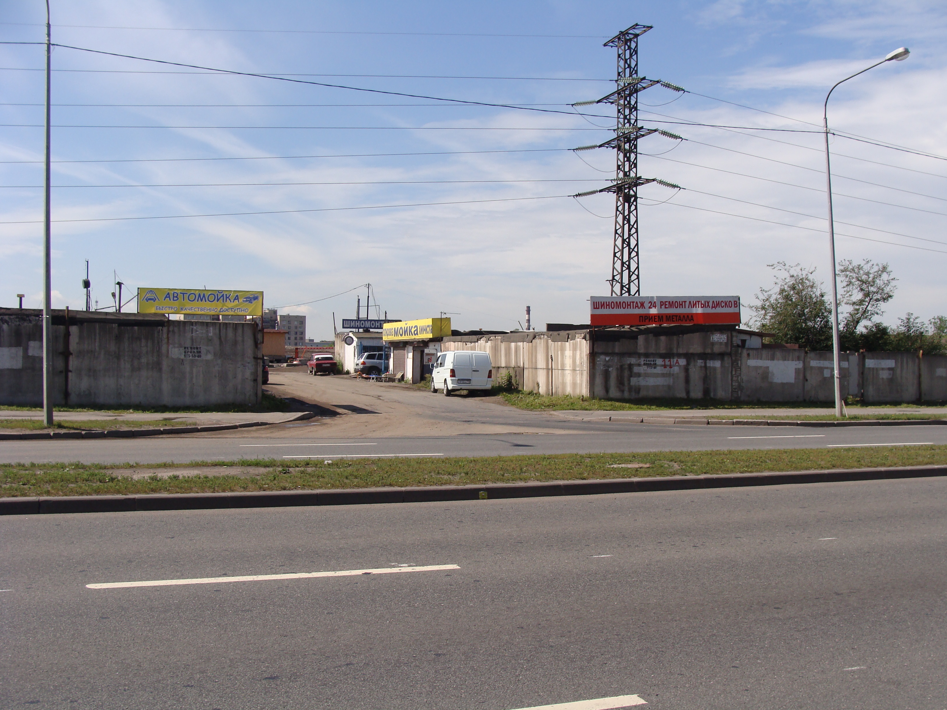 Лабораторное шоссе